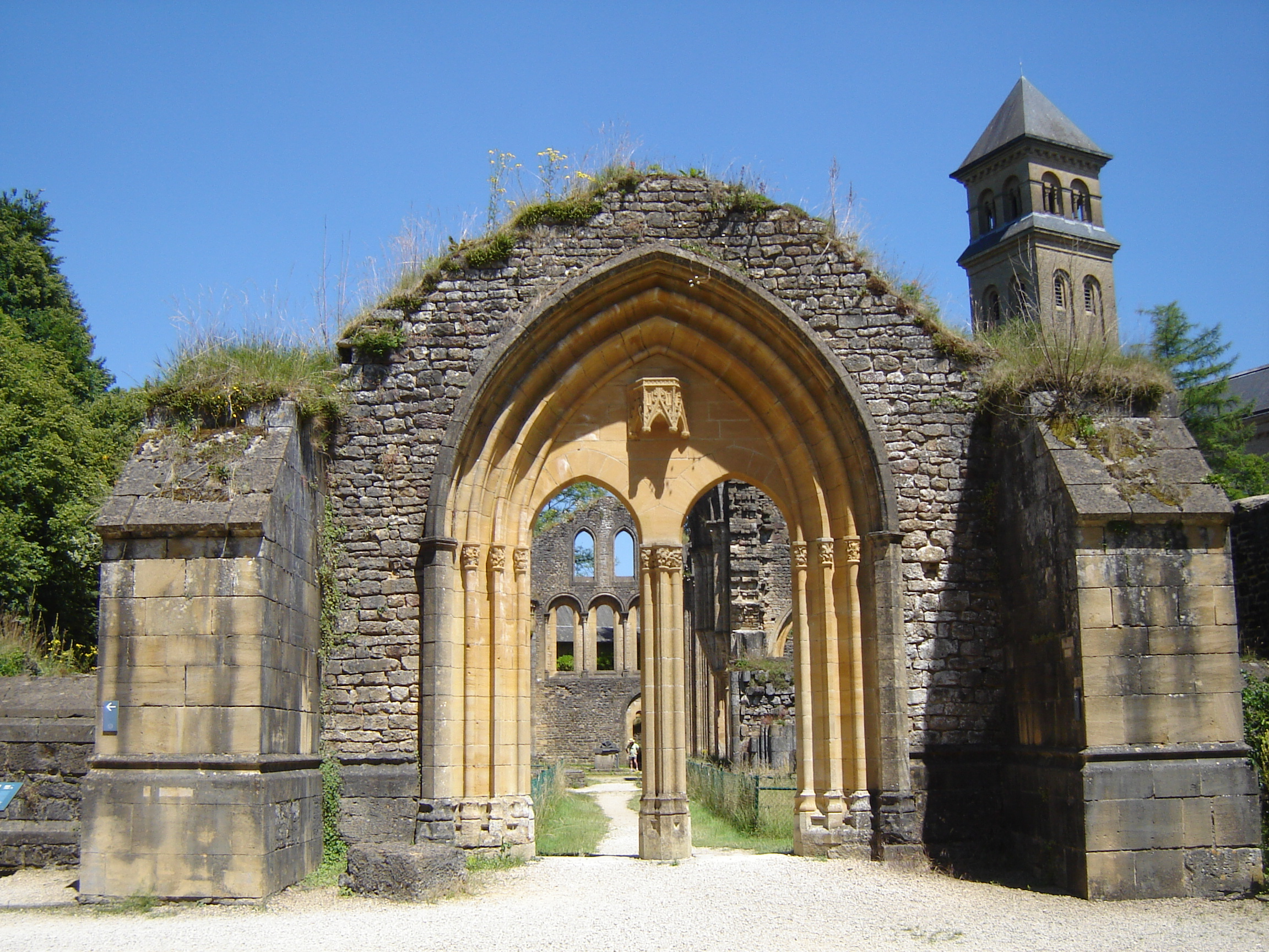 Abbaye d'Orval, ruines de l'ancienne abbaye. Entrée de l'église